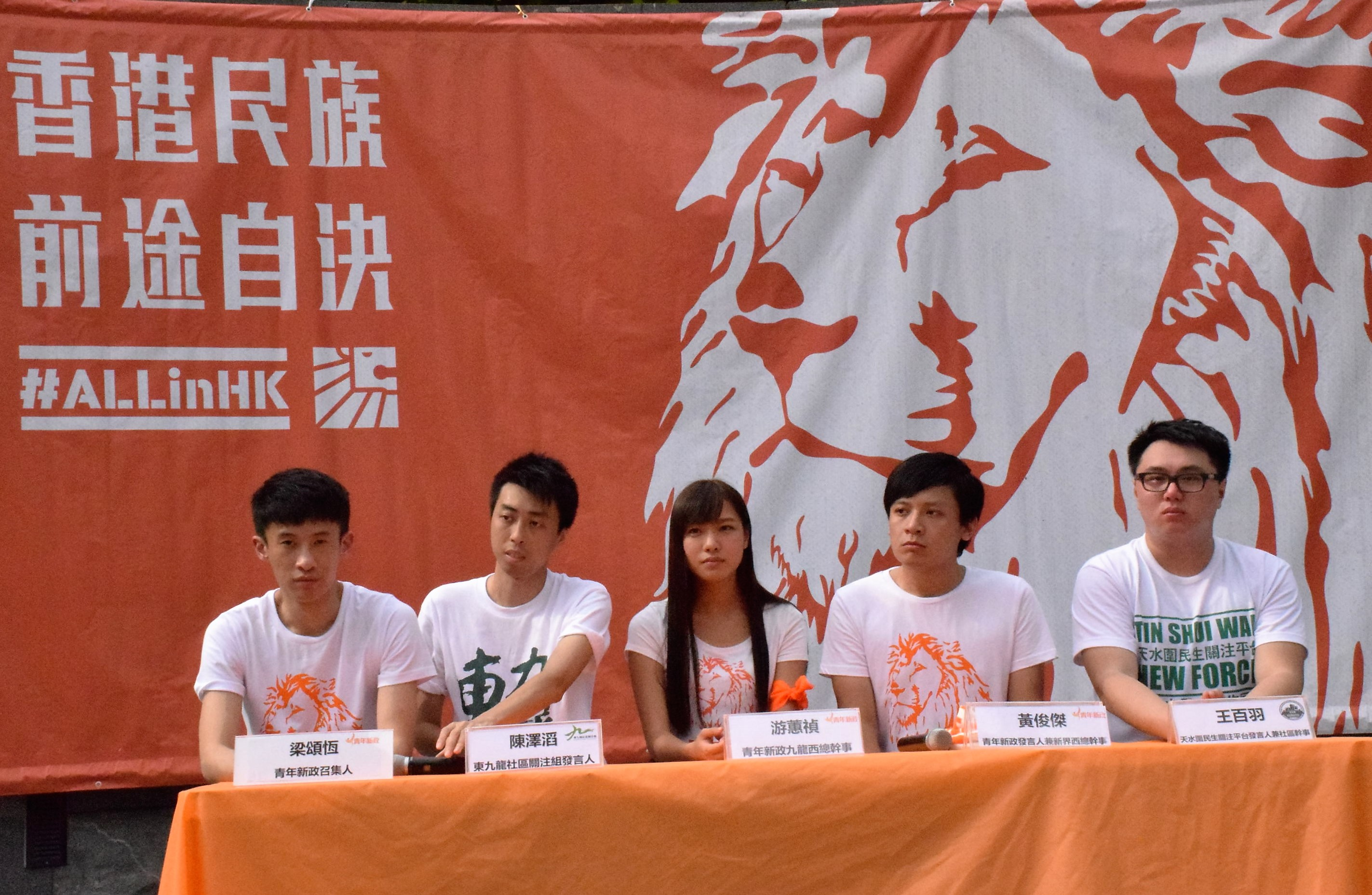 中文（台灣）: 本土派的「ALLinHK」選舉聯盟舉行香港立法會選舉誓師及記者會。(美國之音湯惠芸攝）